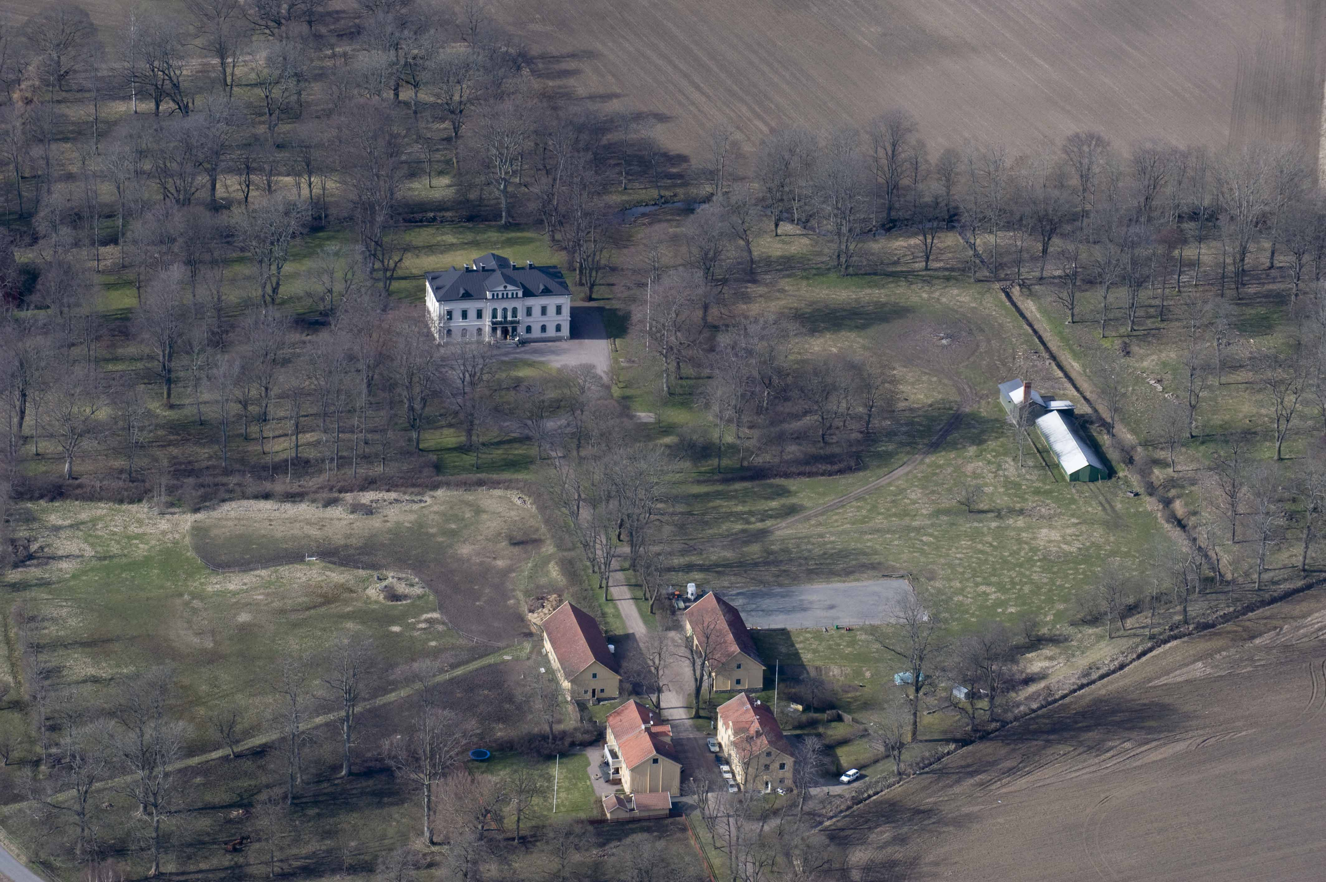 Lyckås manår house from the air